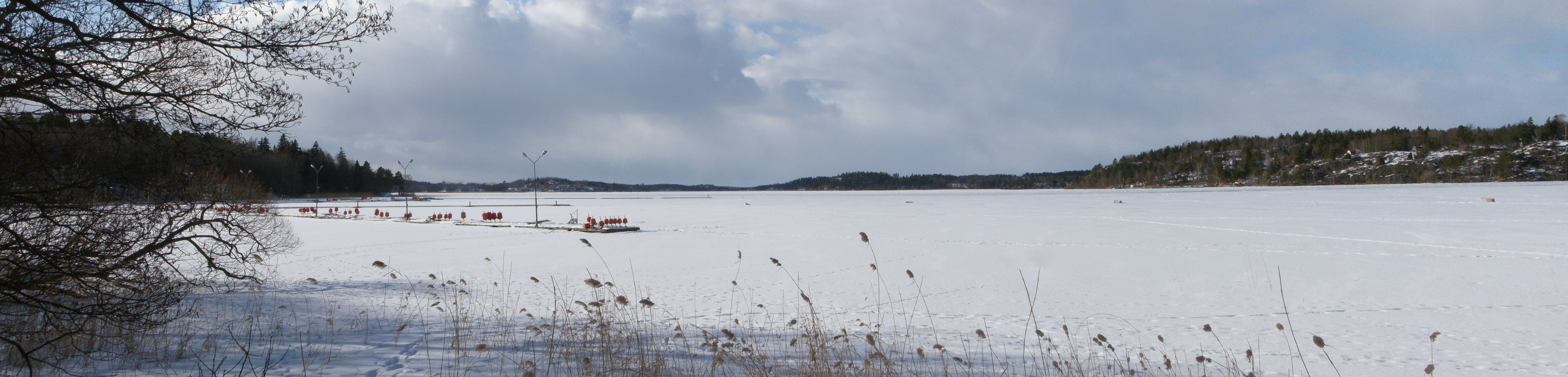 Fiskarfjärden i Mälaren, vy västerut från Fiskarfjärdens båtklubb